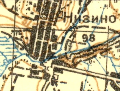 Топографическая карта Ленинградской области, квадрат О-35-12-Г (Ропша), деревня Низино